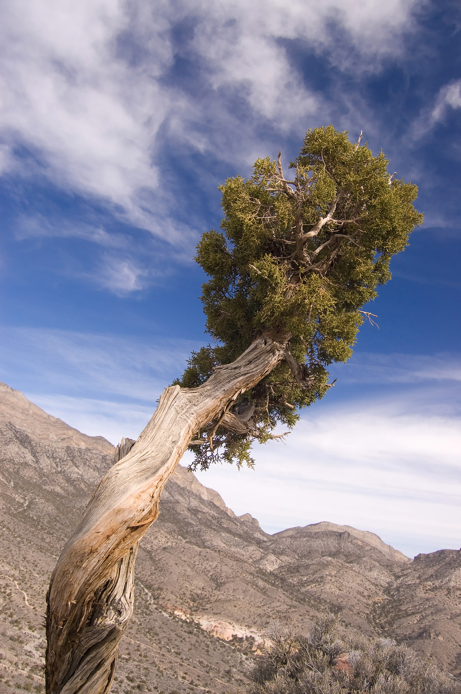 A Utah Juniper Juniperus osteosperma, Red Rock Canyon, Nevada.